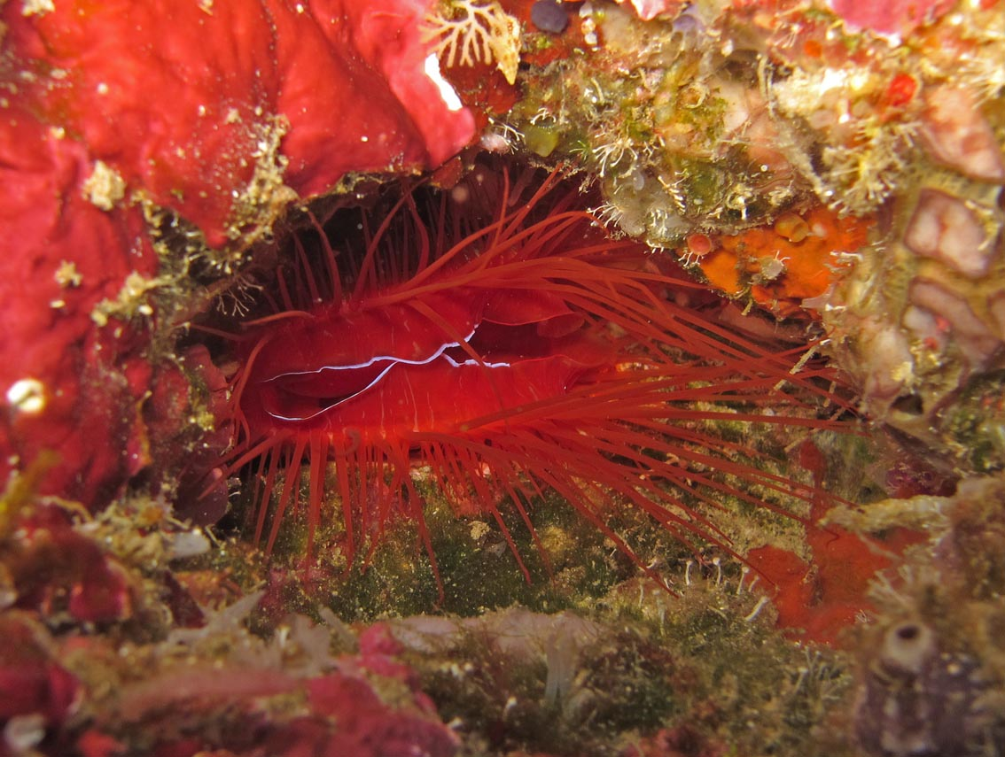 Manado 2-12-11 - 2 disco clam